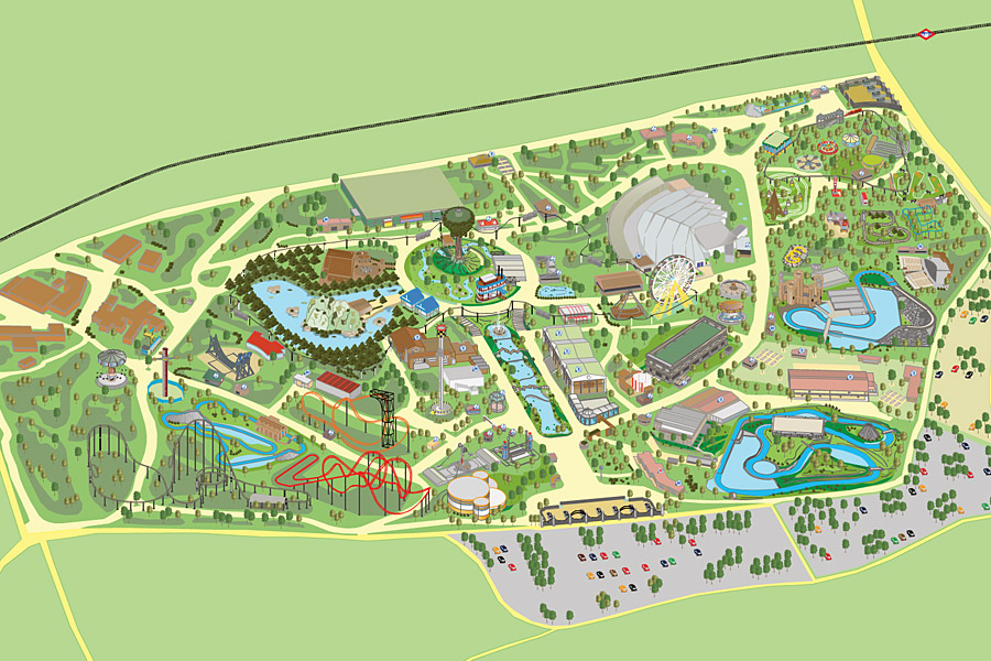 Térkép